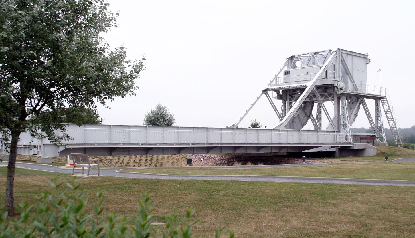 Die originale Pegasus Brücke heute (2005)- die Brücke, die heute über die Orne führt ist ein modernerer Nachbau von 1993. Das Original steht heute im benachbarten Museum.